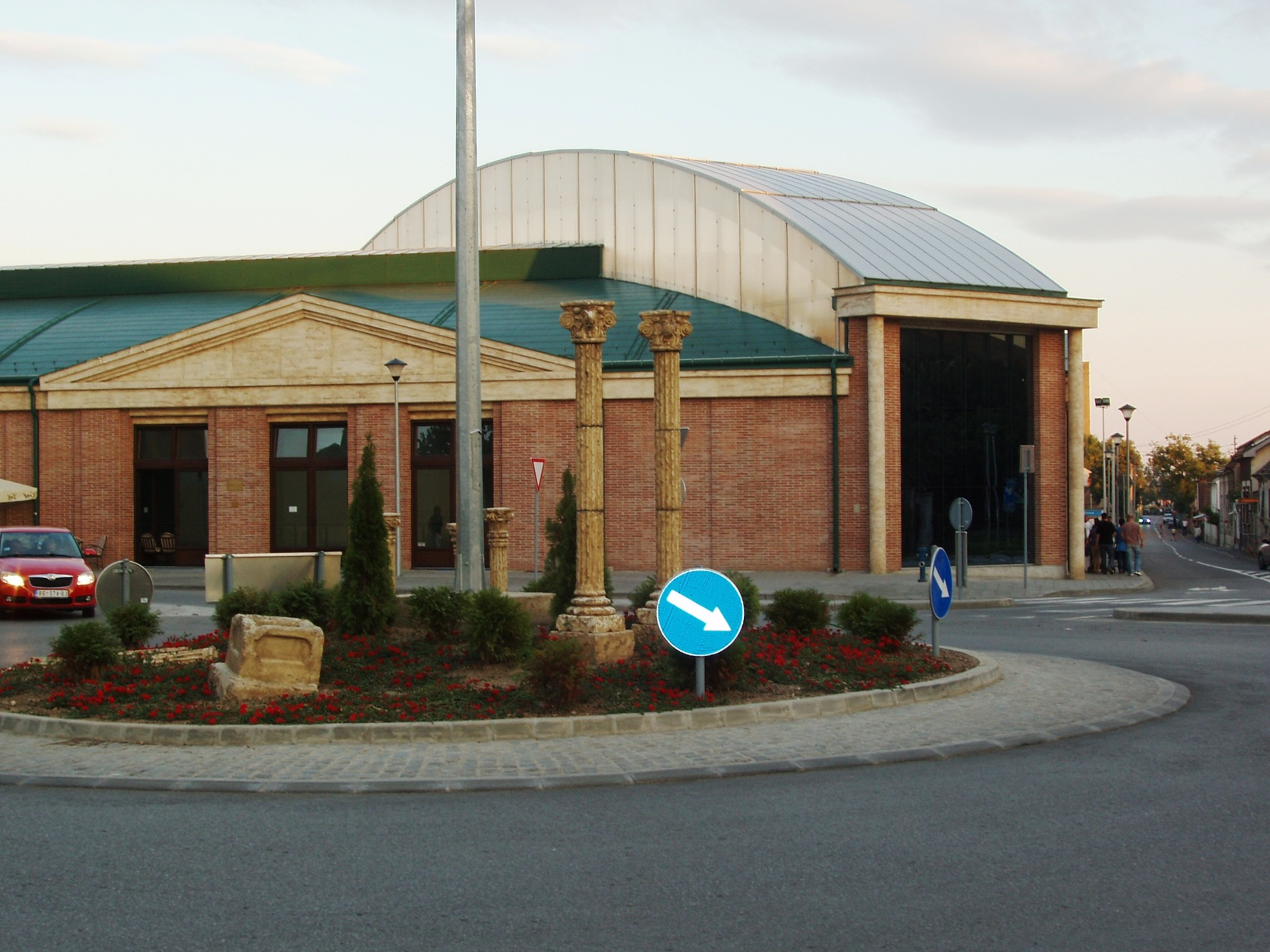 Umetnost na temu Starog Rima u Sremskoj Mitrovici.